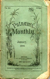 couverture de Putnam’s Monthly